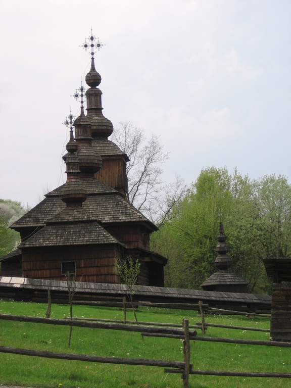 Small wooden Ruthenian church in Svidnik skansen.